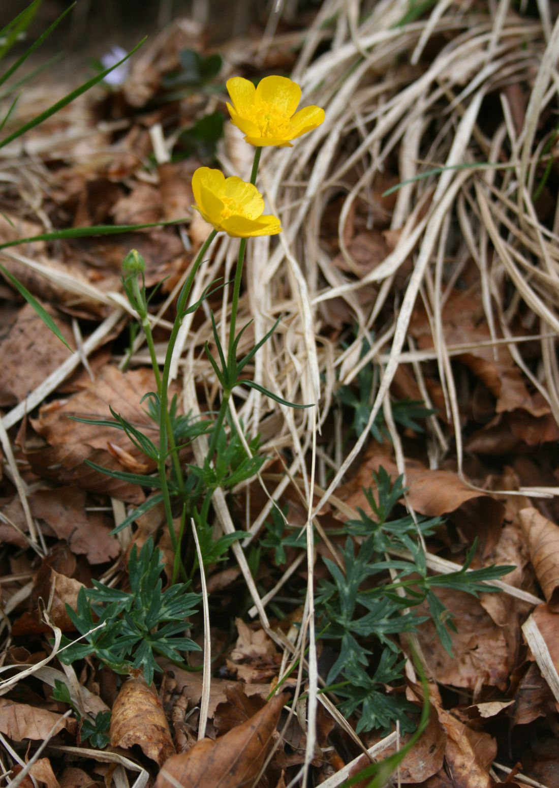 Ranunculus pollinensis, Hahnenfußgewächse (Ranunculaceae) - Italien/Italia/Italy: Toscana, Prov. Lucca, Parco Regionale delle Alpi Apuane, N Foce Giovo, gegen Pizzo d'Uccello